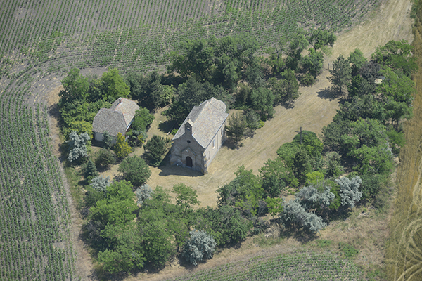 Nagykopáncs (Kopáncs-puszta) Árpád-kori temploma légifotón (Tótkomlós, Békés megye)